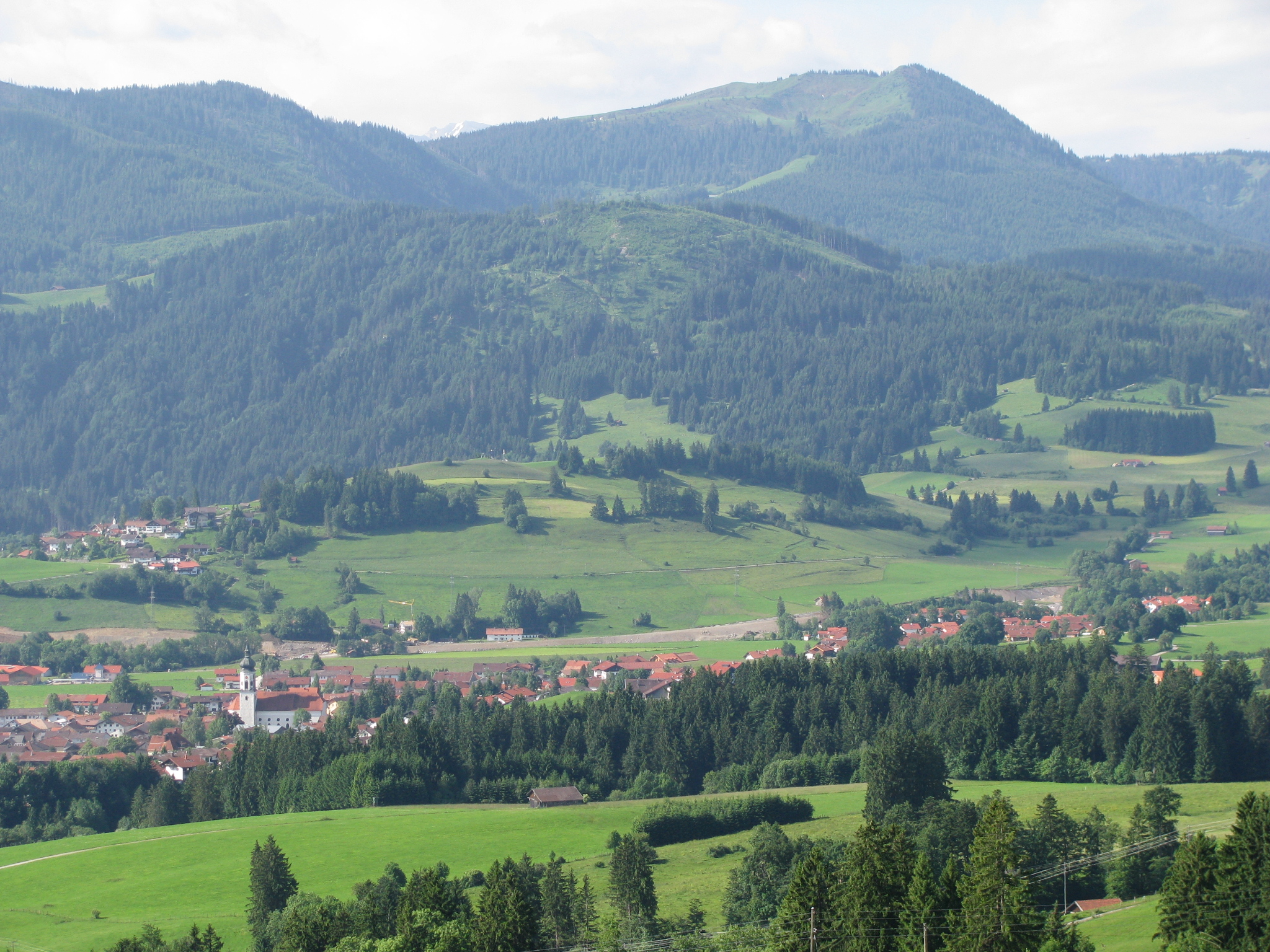 Wertach, Landkreis Oberallgäu, Bayern